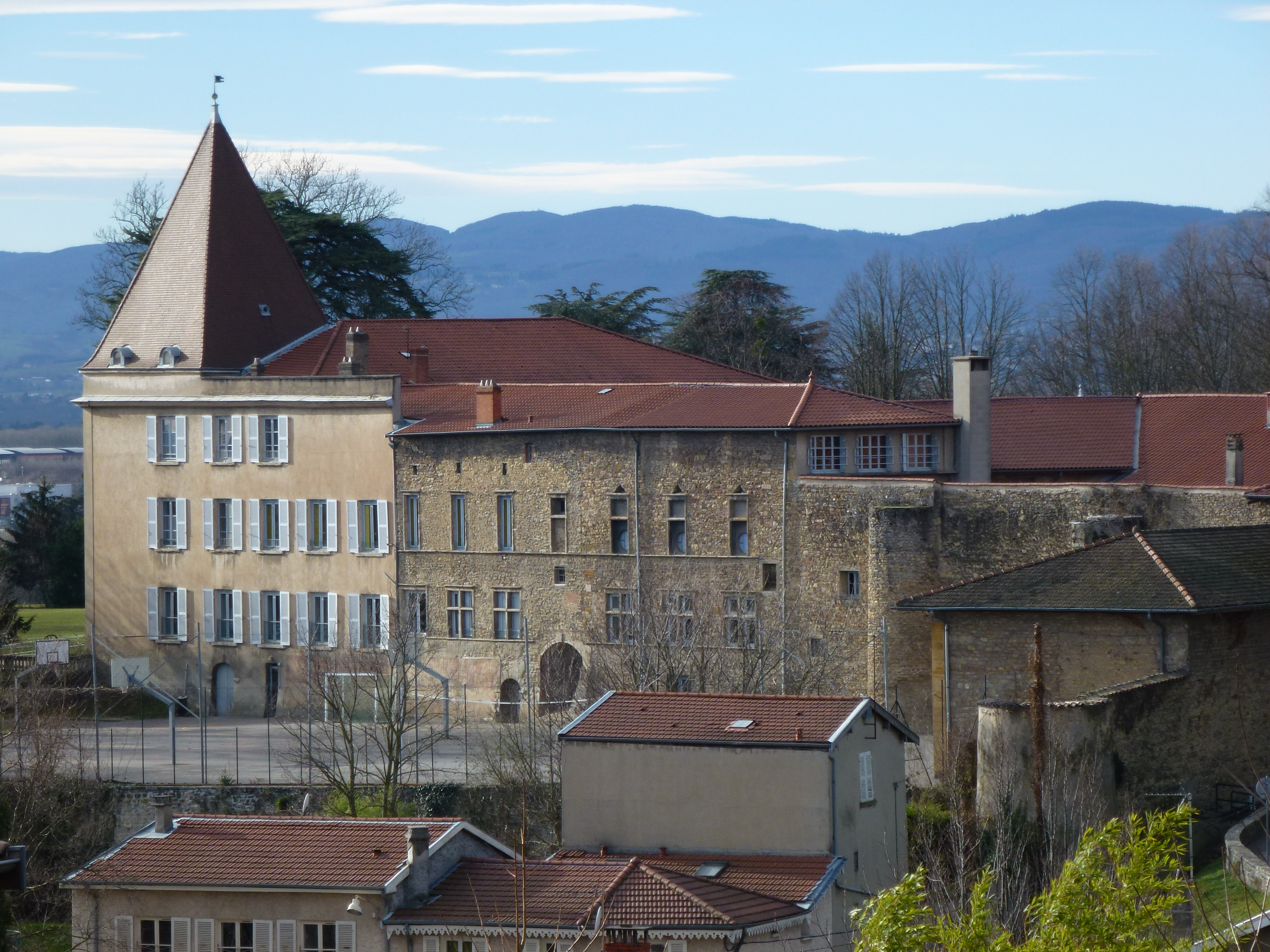 Château de Fromente à Saint-Didier-au-Mont-d'Or dans le Rhône